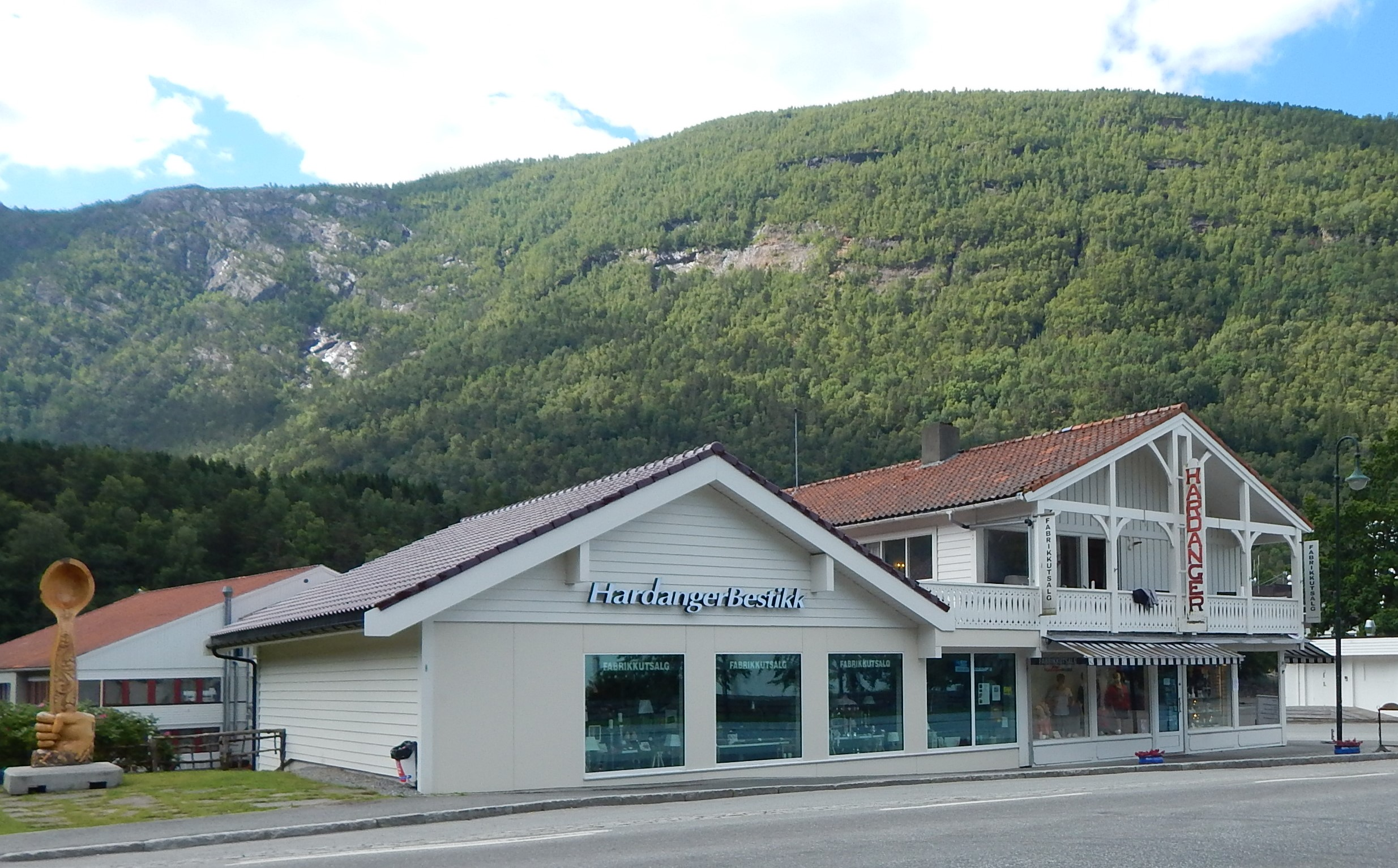 Fabrikkutsalget til Hardangerbestikk i Kinsarvik